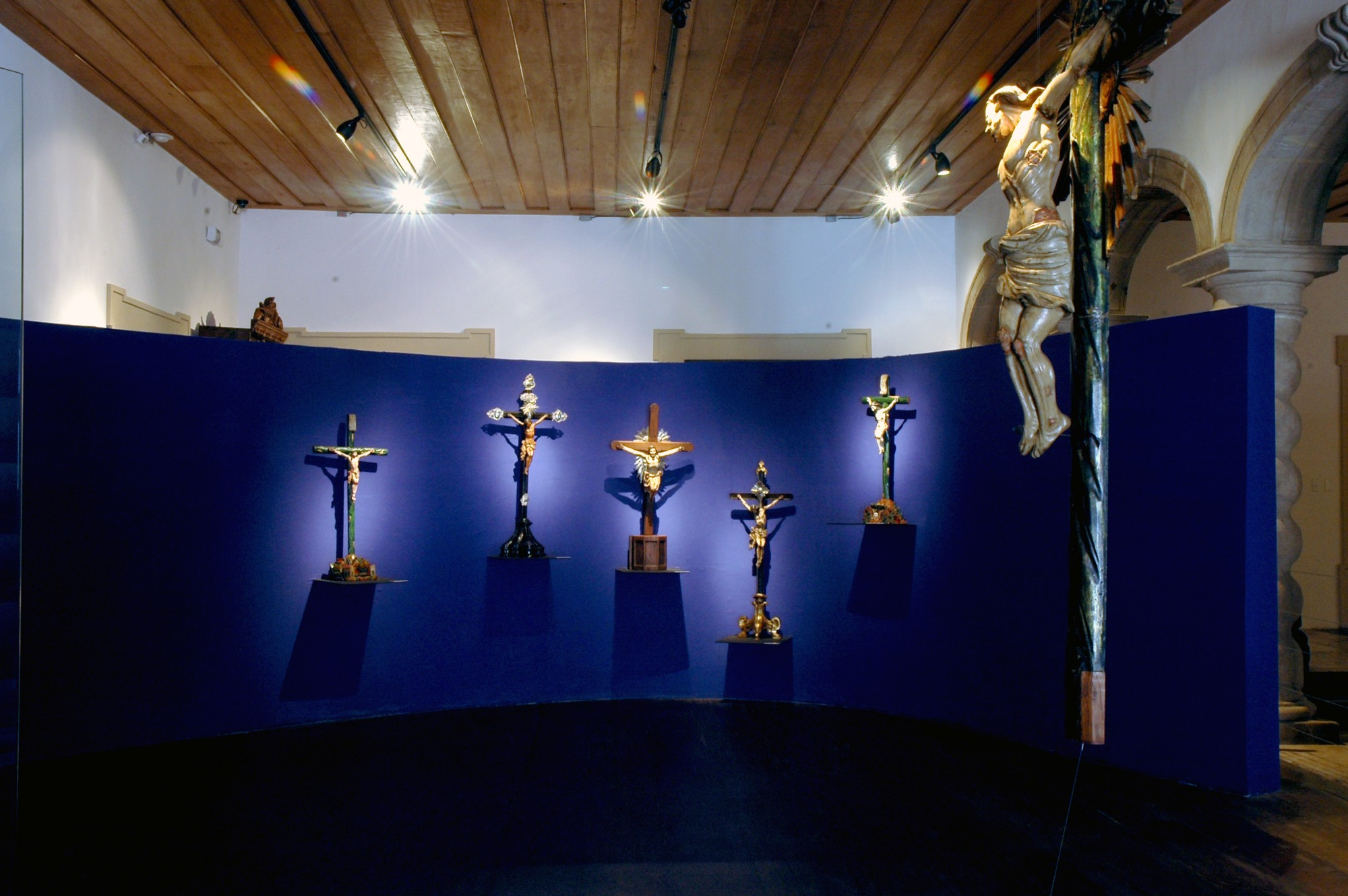 Interior do Museu Abelardo Rodrigues de arte sacra, em Salvador, Bahia, Brasil. Acervo originalmente pertencente ao advogado pernambucano Abelardo Rodrigues